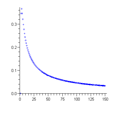 Segida konbergentea zerorantz.